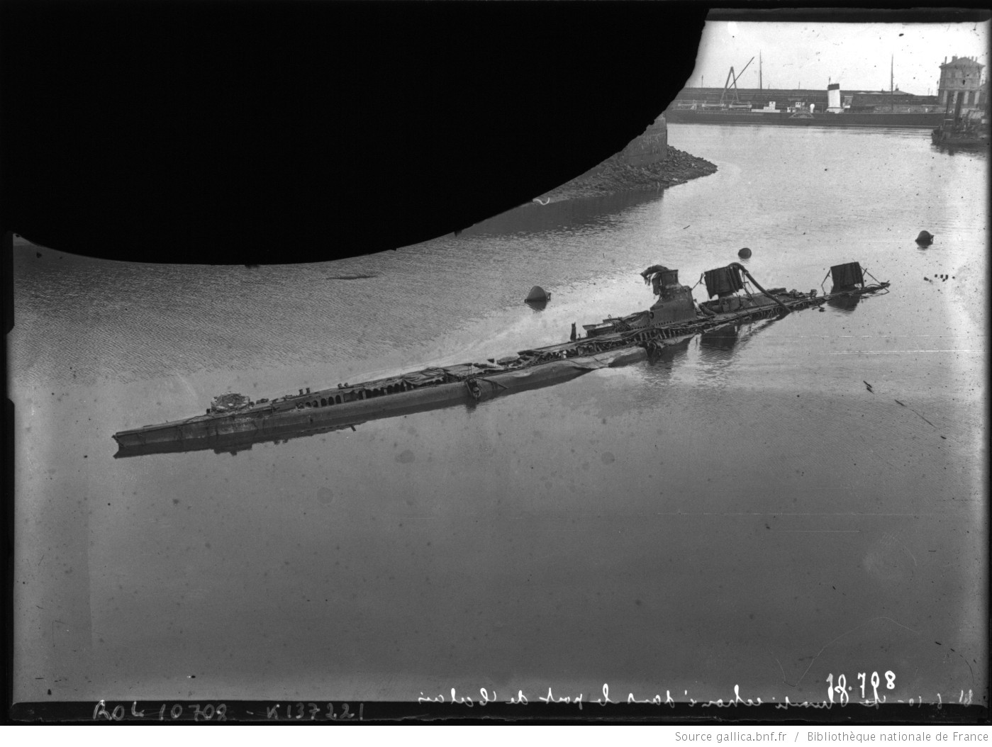 Le sous-marin "Le Pluviôse", coulé le 26 mai 1910 au large de Calais par le vapeur "Pas-de-Calais", échoué dans le port de Calais, après son naufrage le